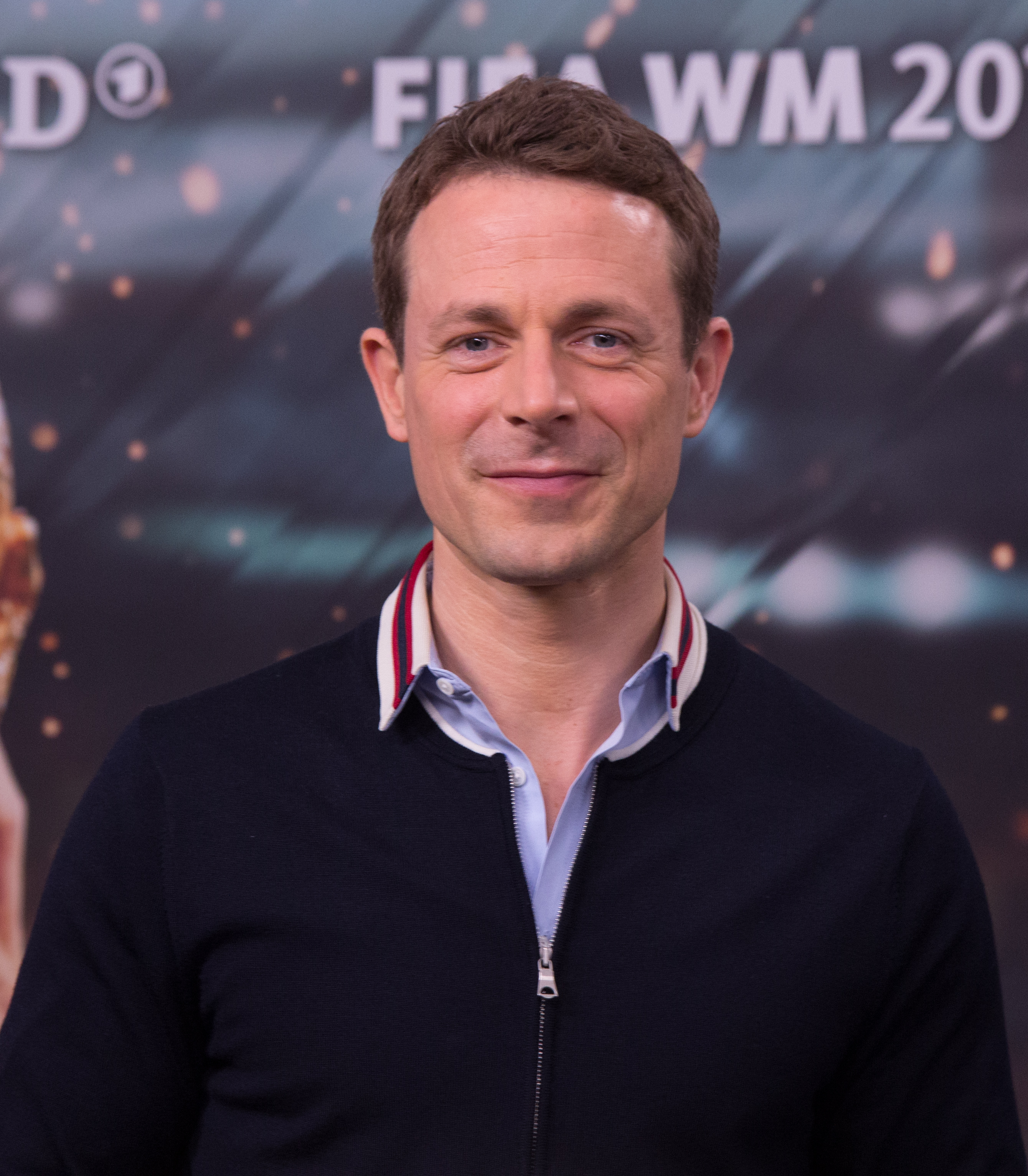 FIFA WM 2018 Pressevorstellung von ARD und ZDF in Hamburg: Alexander Bommes